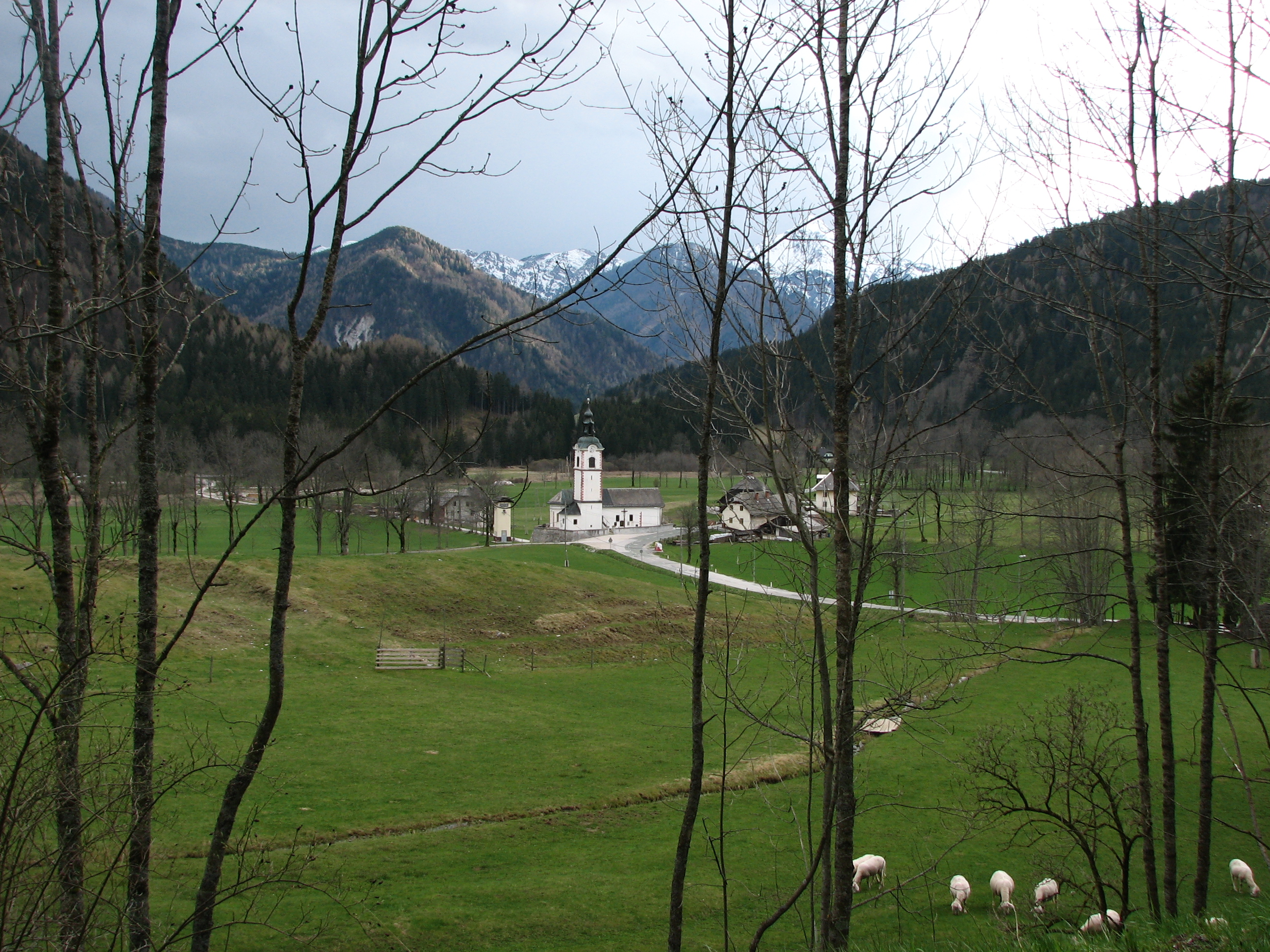 Zgornje Jezersko